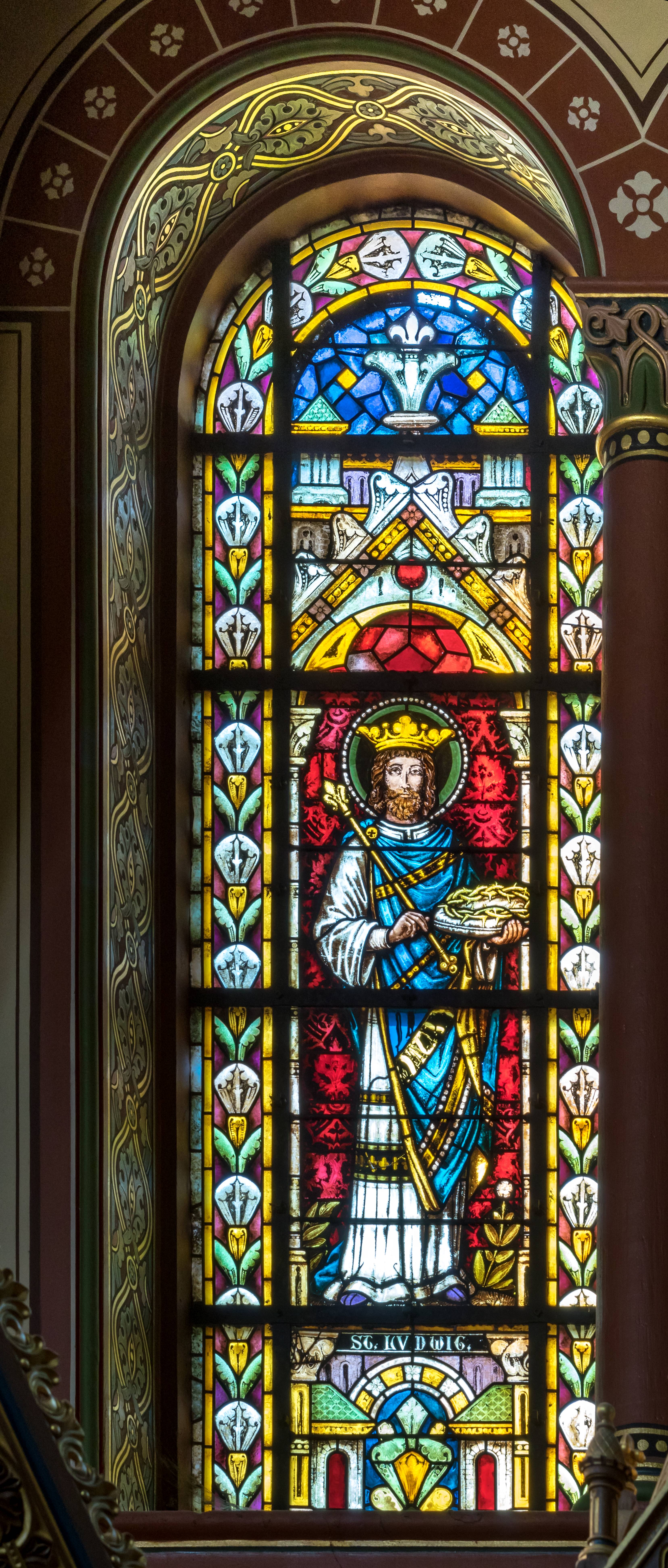 St. Peter und Paul in Bonndorf Die Glasfenster im Chor in der Kirche